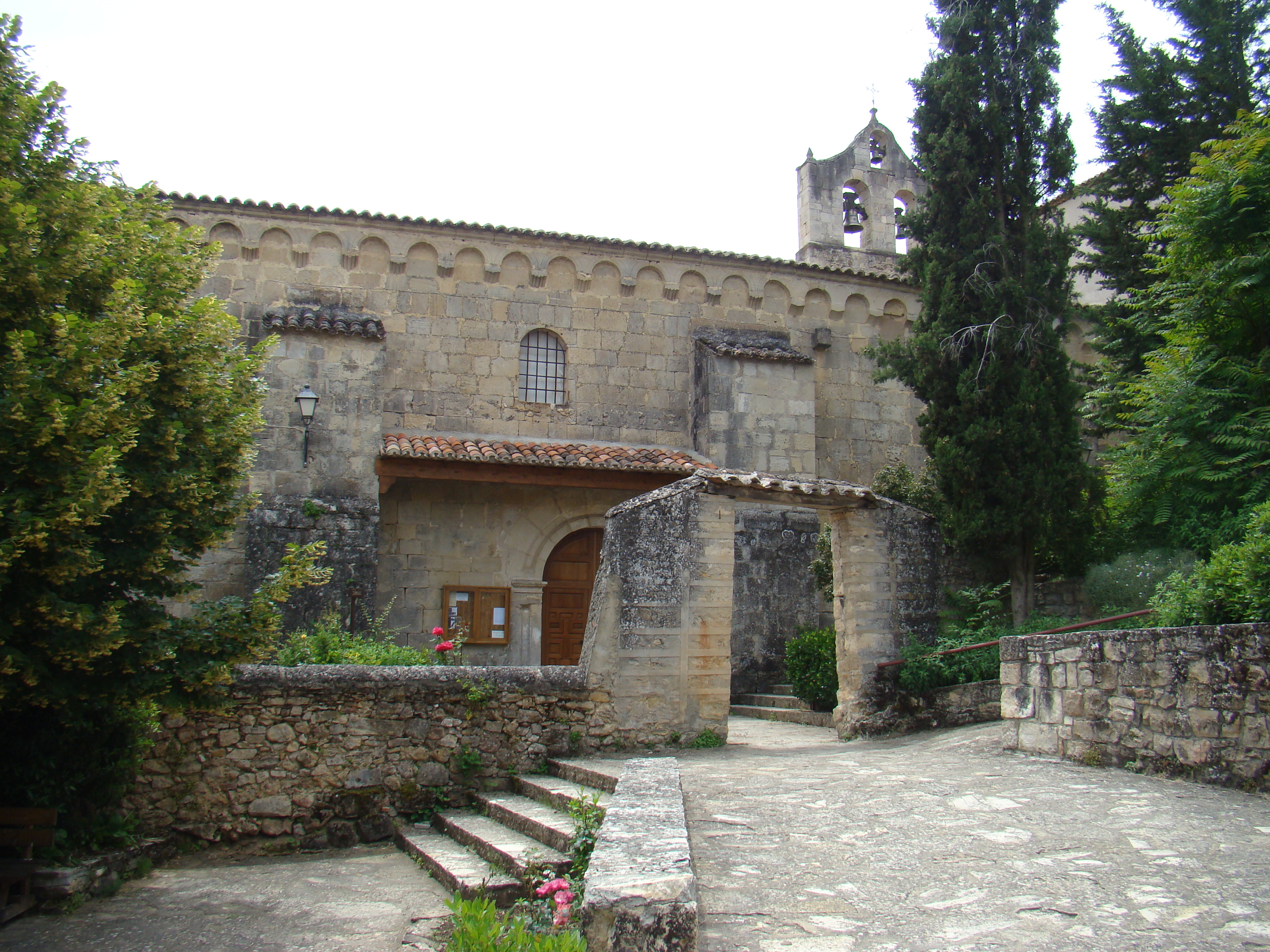 Buenafuente del Sistal, monasterio cisterciense femenino. Provincia de Guadalajara. Entrada actual a la iglesia.